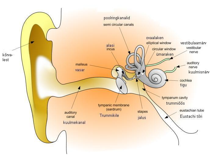 Inimkõrva läbilõige